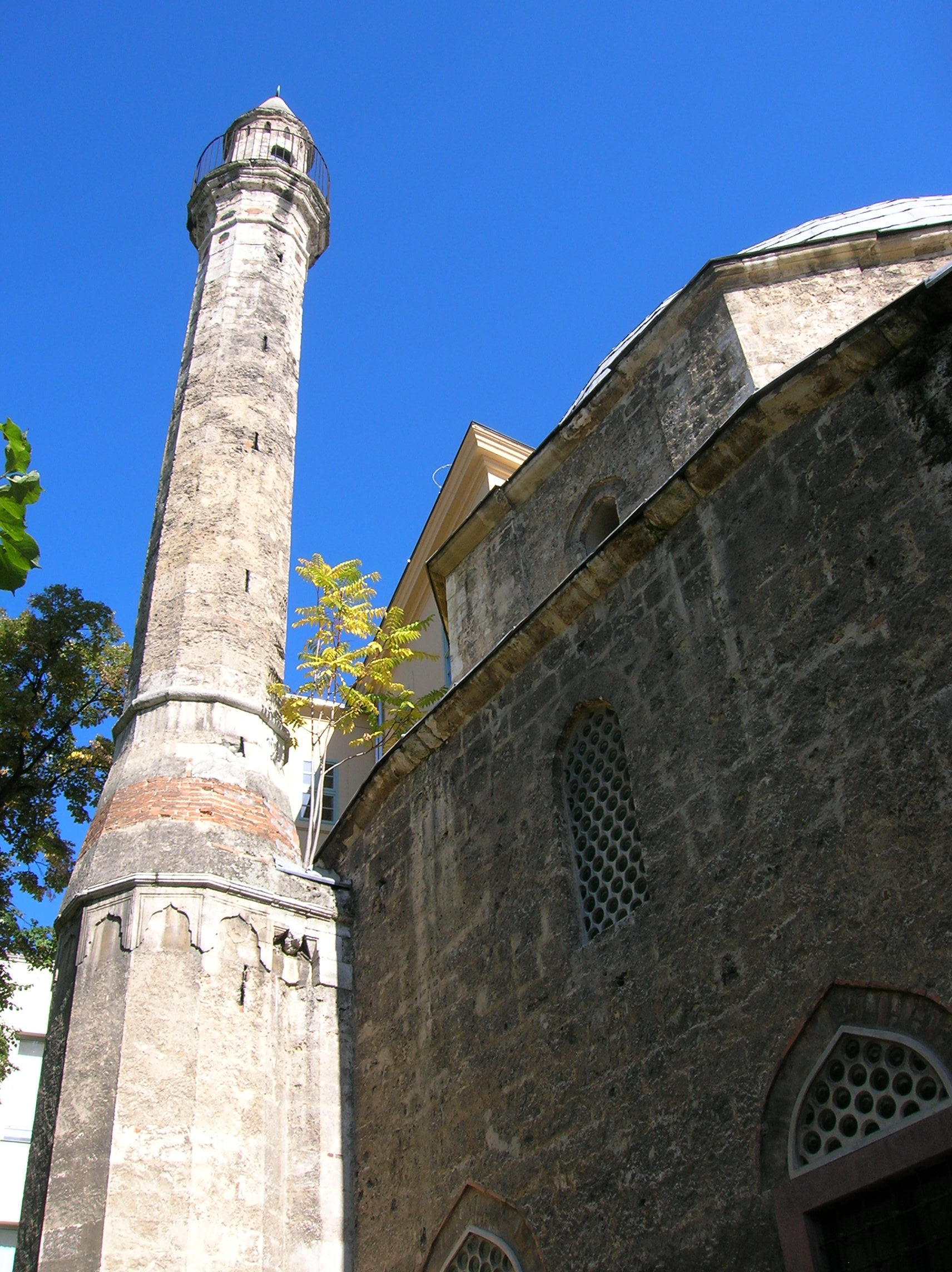 Minaret of Yakovali Hassan mosque, Pécs